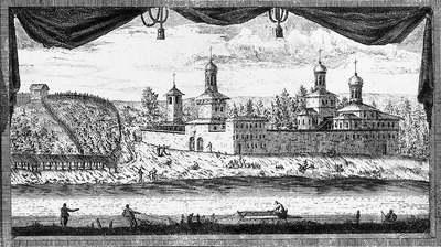 Андреевский Преображенский Московский монастырь в Пленницах